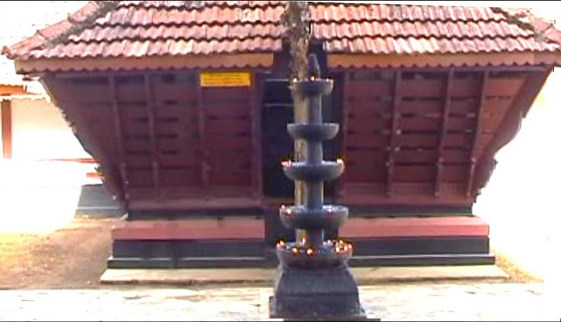 This picture is taken by me, my own camera. edited by me.......